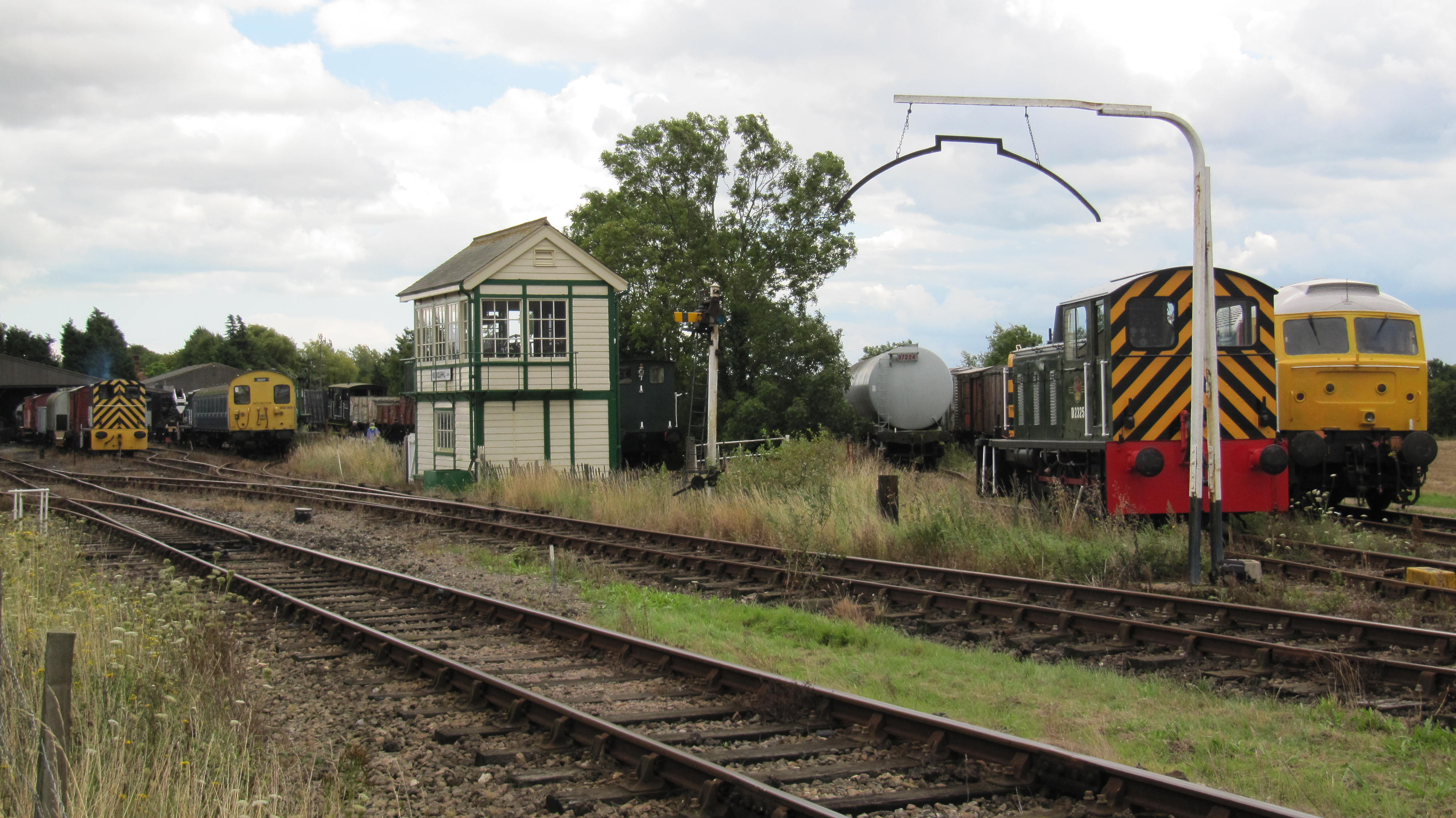 Mangapps Railway Museum 27/08/2011